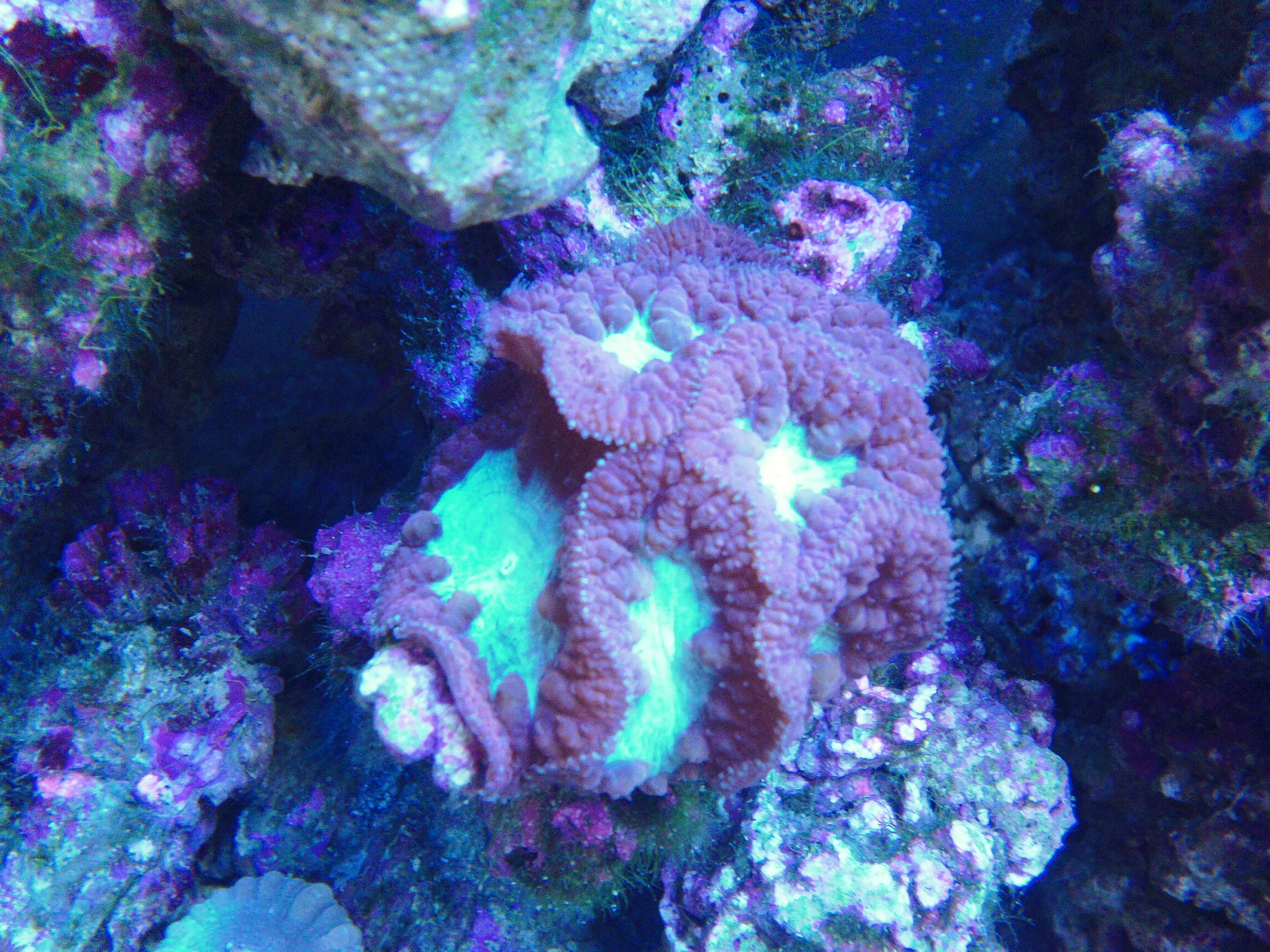 Blastomussa wellsi